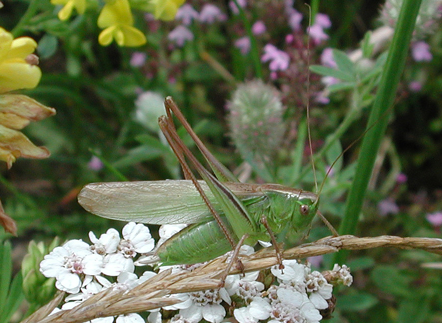 Metrioptera bicolor, forma diluta, male, Wildau, Brandenburg, Germany